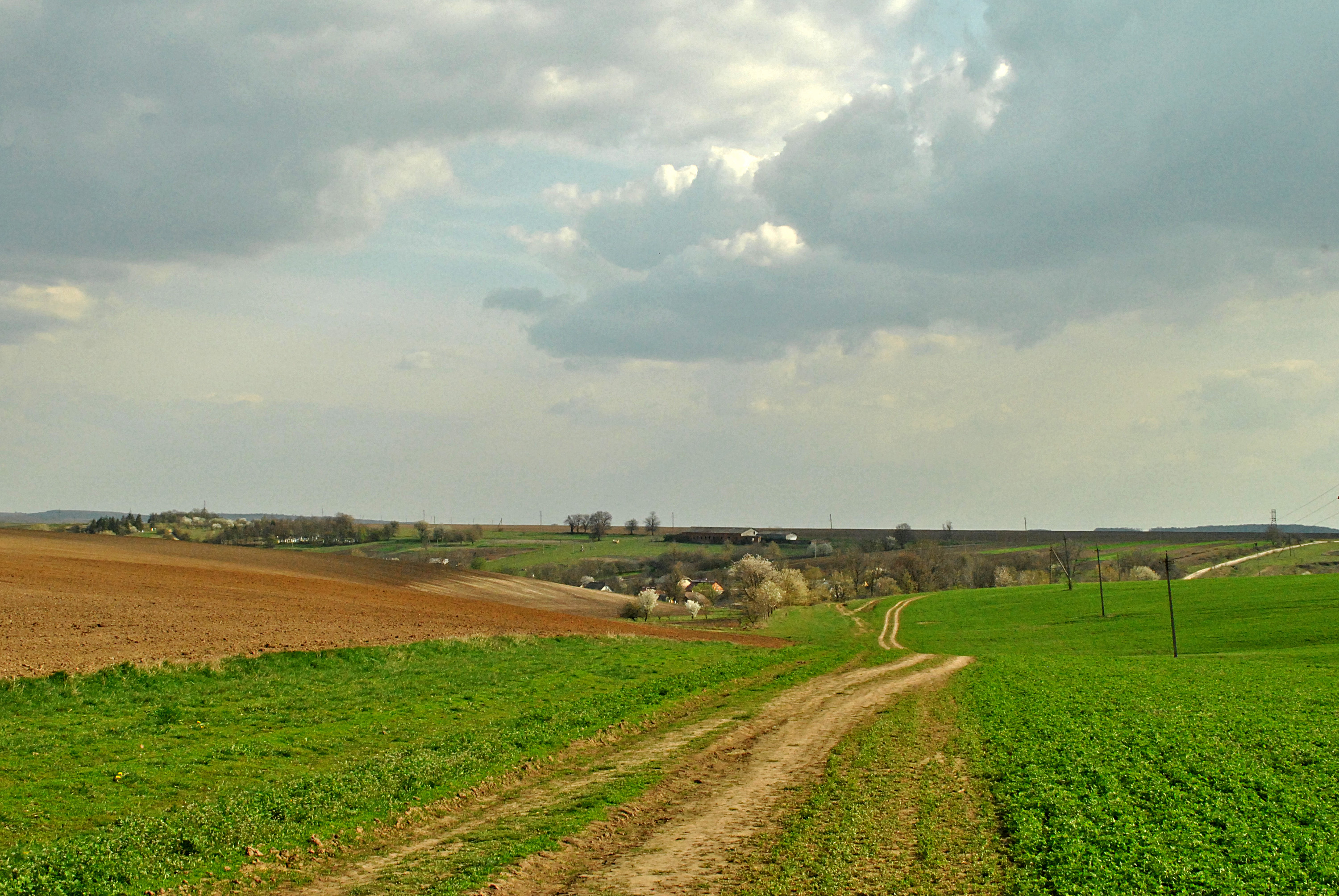 Панорама села Русилова з північного боку. Польова дорога з Ліщанців. Справа вдалині видніється автошлях С200305 «Русилів — Соколів».